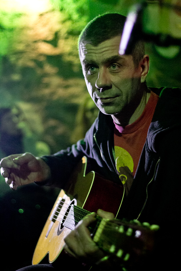 Tallinn 2012